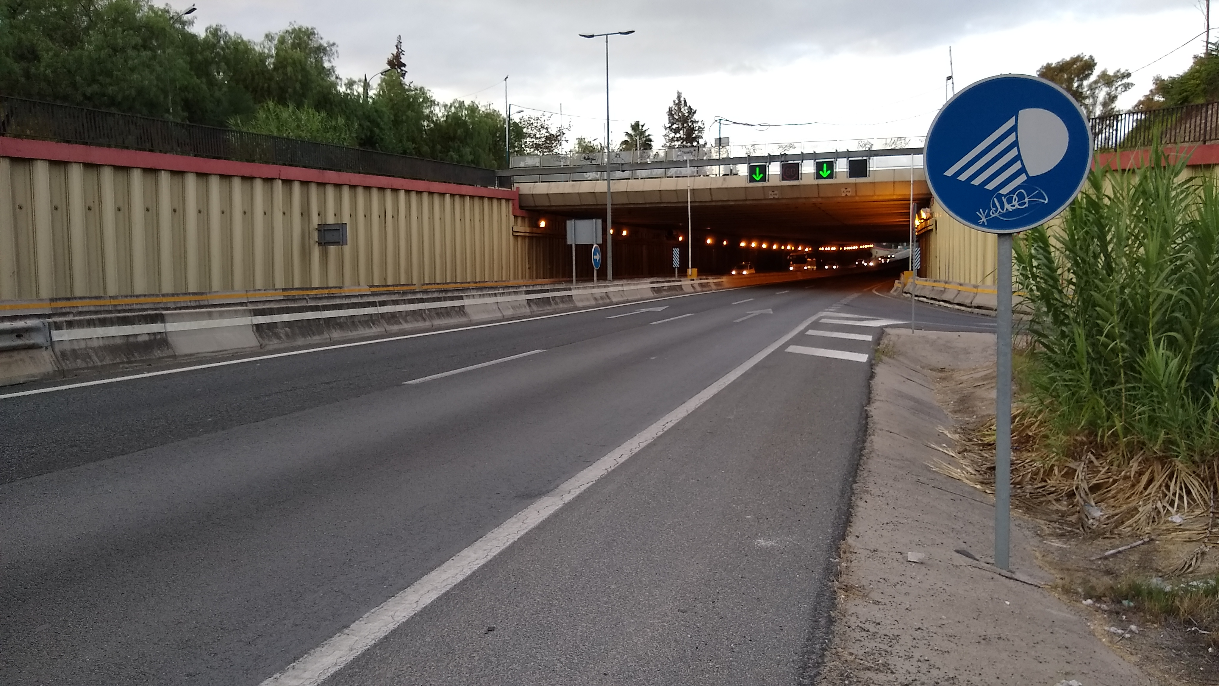 Túnel de la autovía A-8058. San Juan de Aznalfarache, provincia de Sevilla, Andalucía, España.